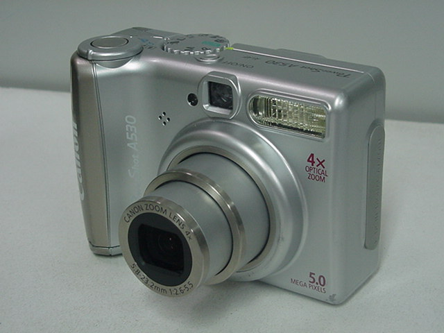 Appareil photographique numérique Canon PowerShot A530 - Vue générale